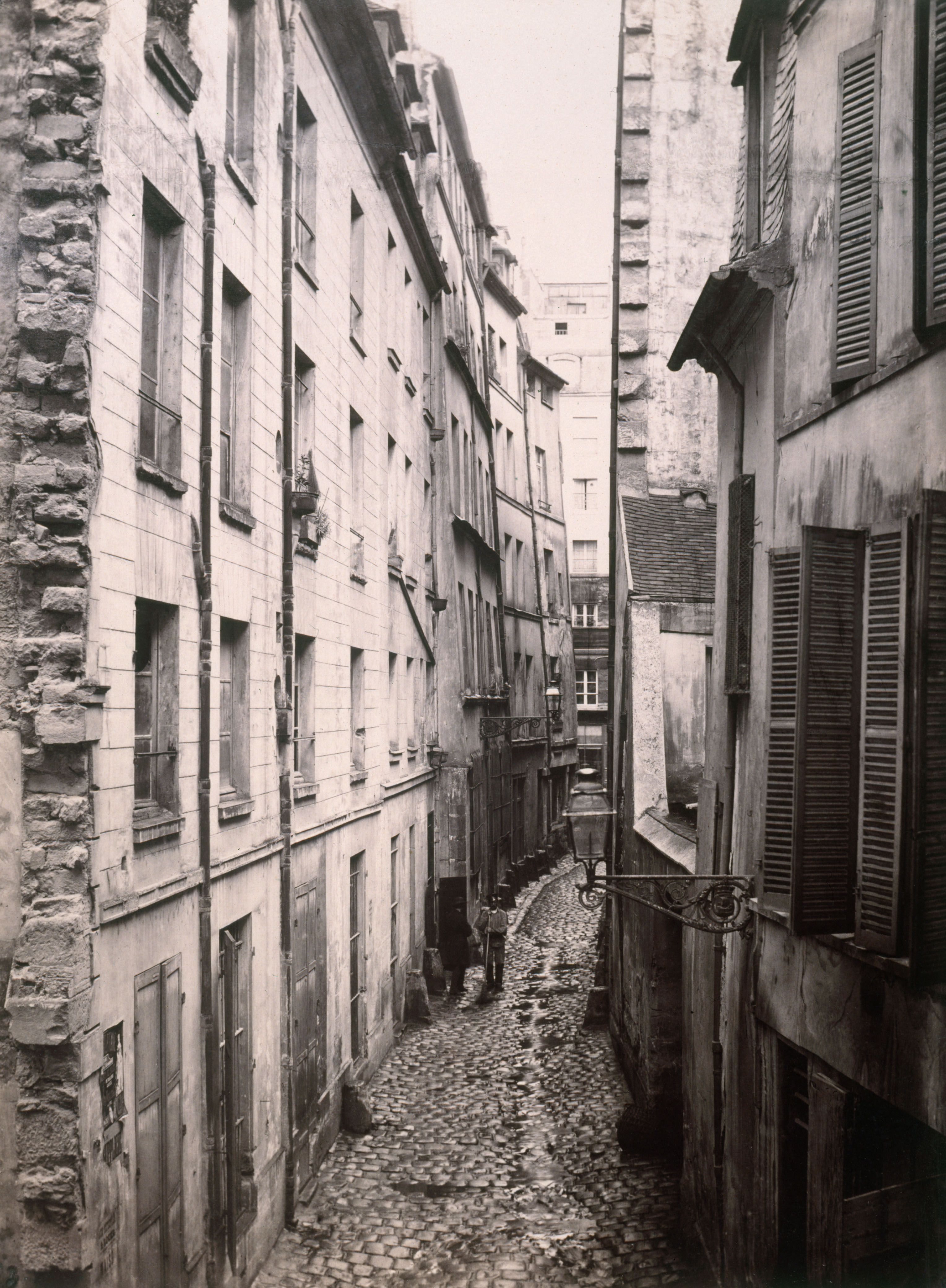 La rue Gervais-Laurent prise depuis le nouveau tribunal de commerce en 1865, avant la démolition de le rue en 1866.